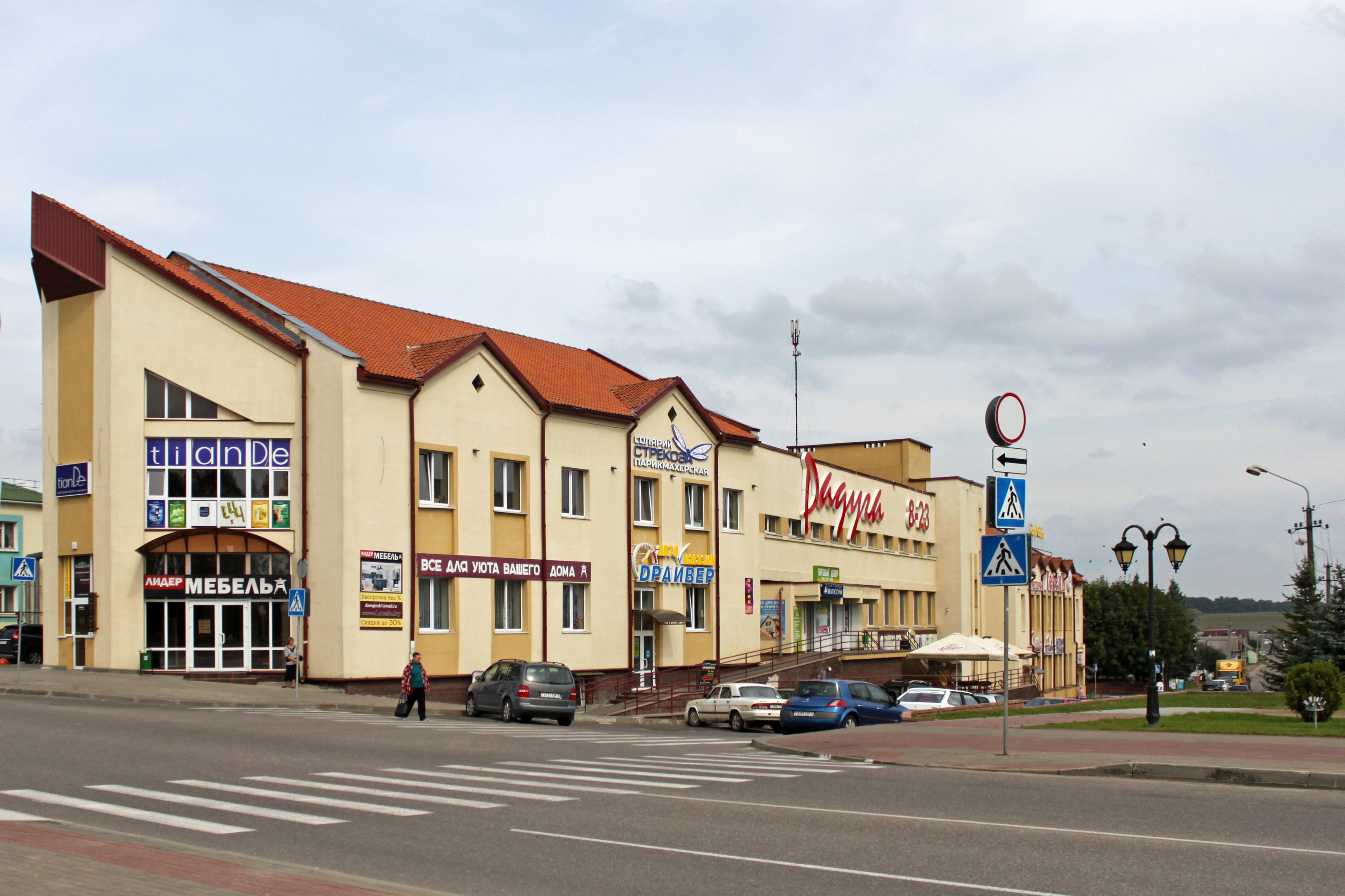 Дзержинск (Минская область), улица Советская